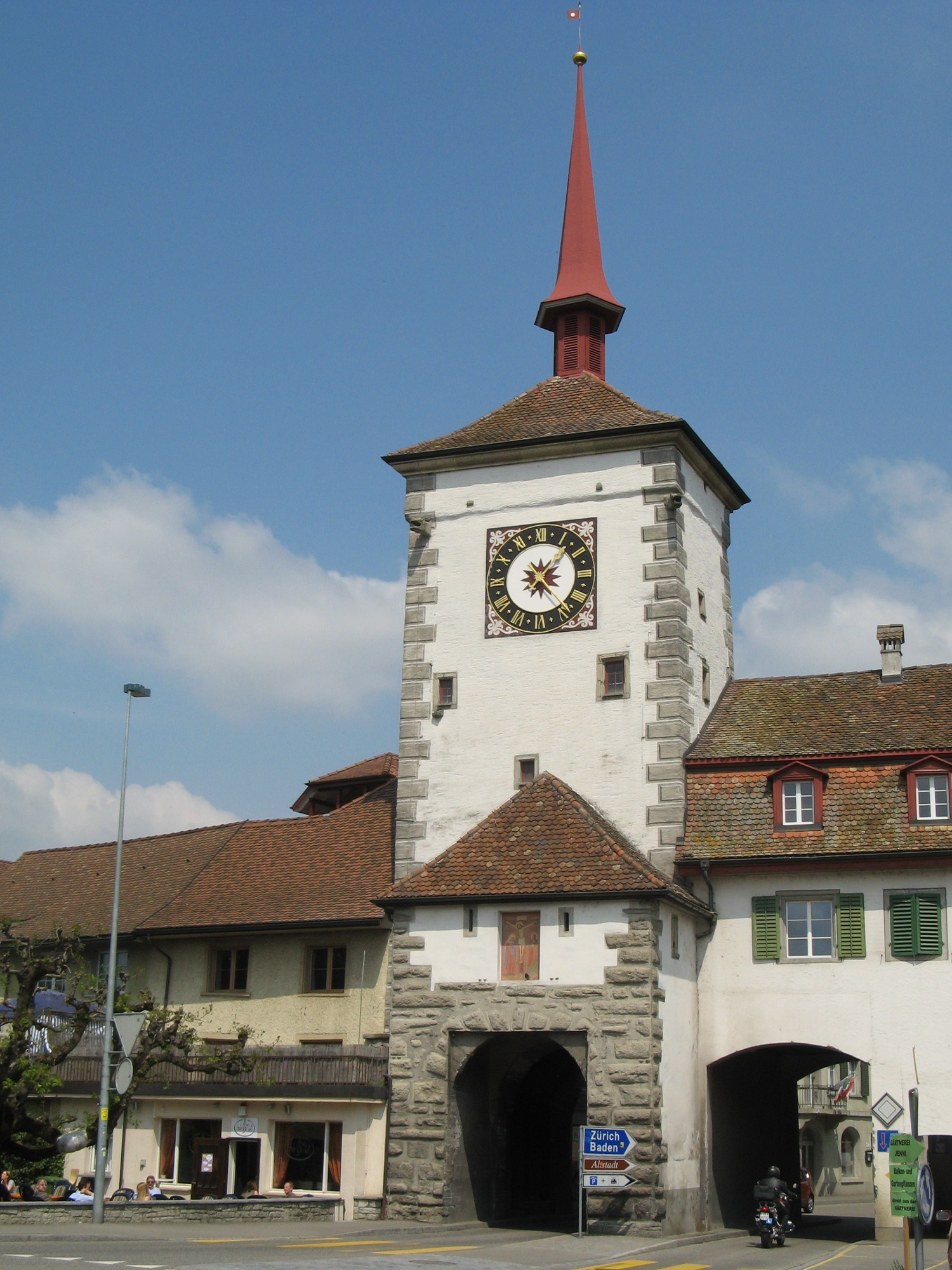 Zeitturm in Mellingen, vom Lindenplatz aus gesehen